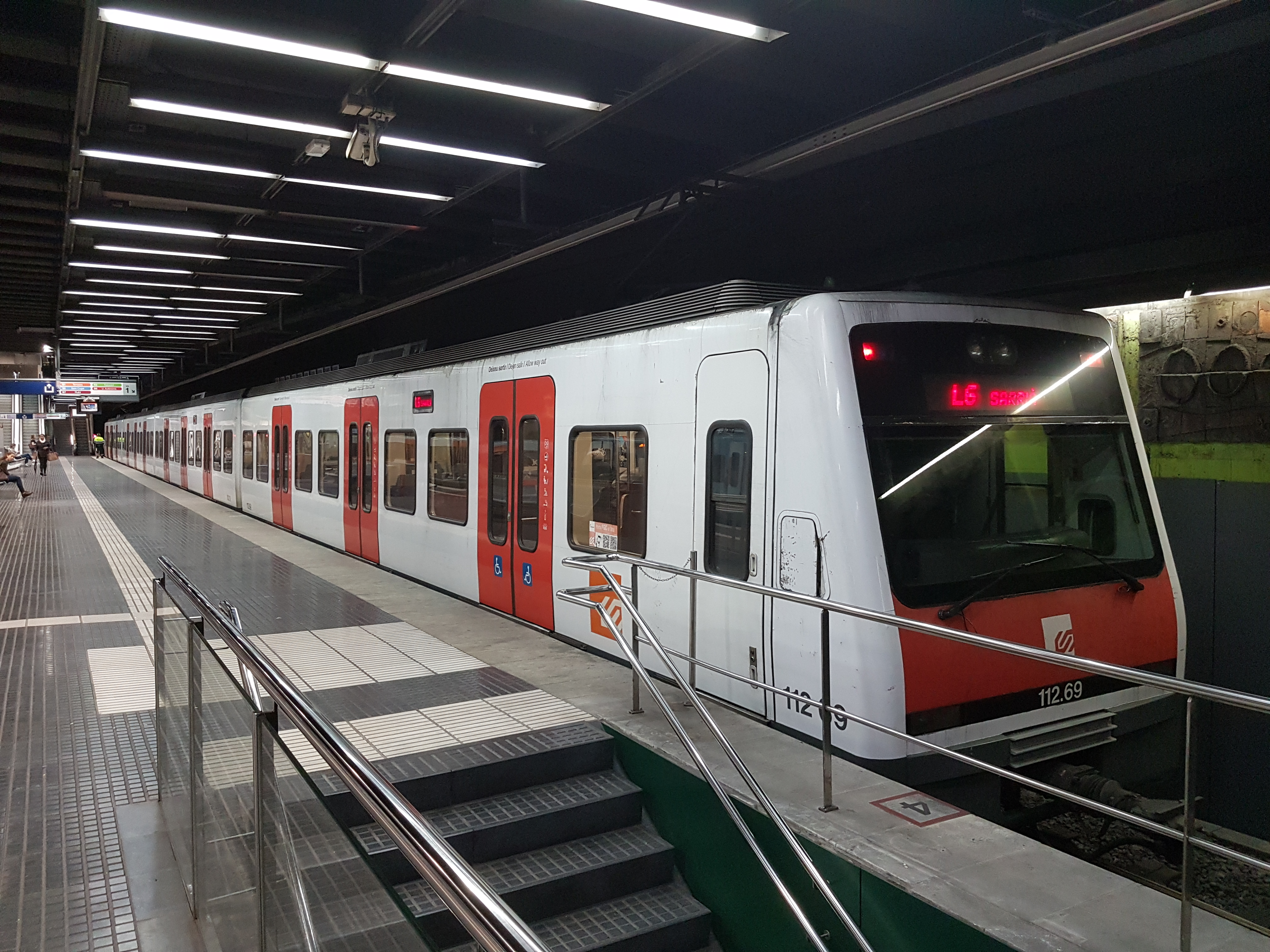 Tren de la sèrie 112 a la via 1 amb servei L6 Sarrià